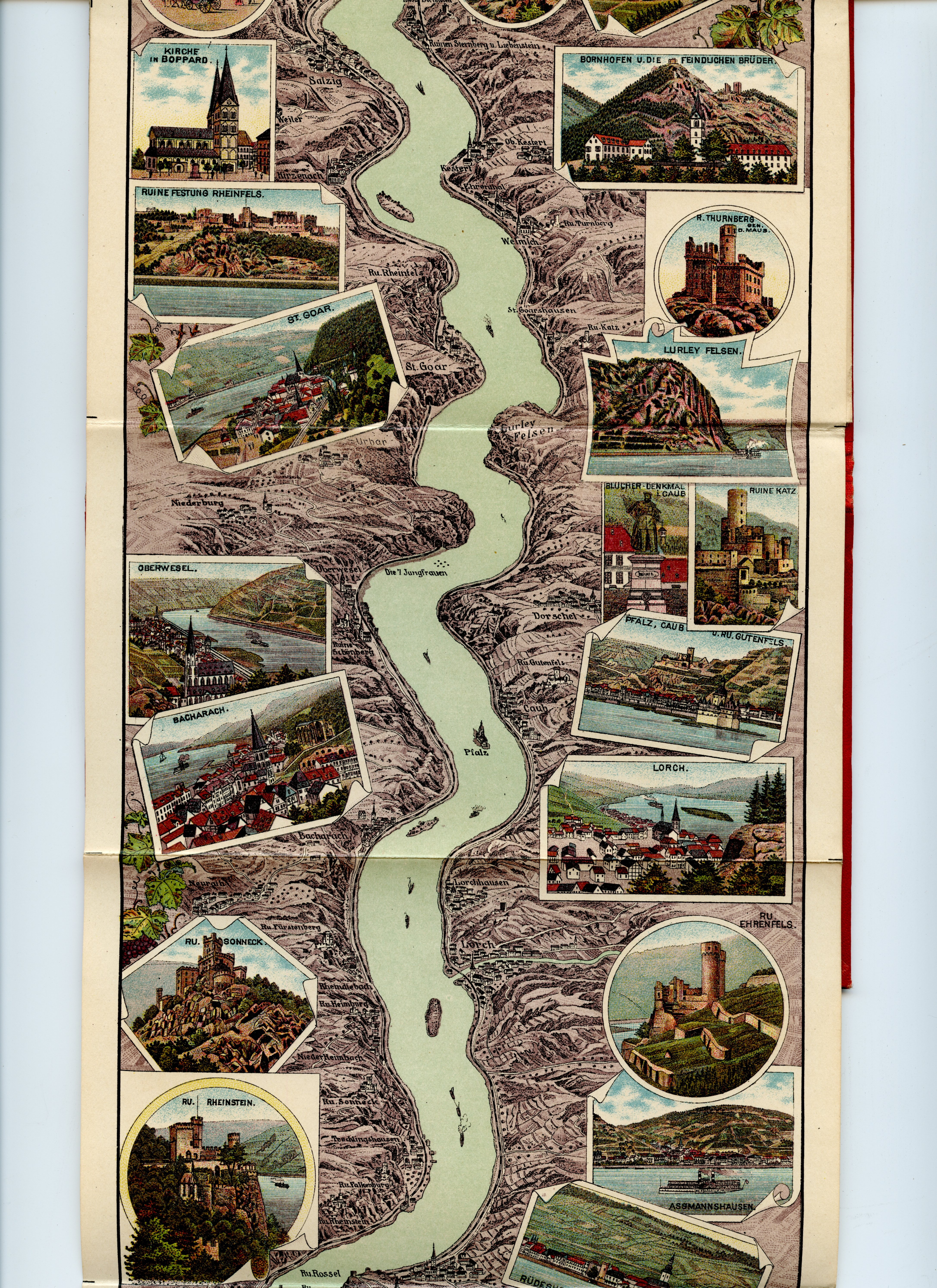 Neuestes Rhein-Panorama von Mainz-Cöln, 1909